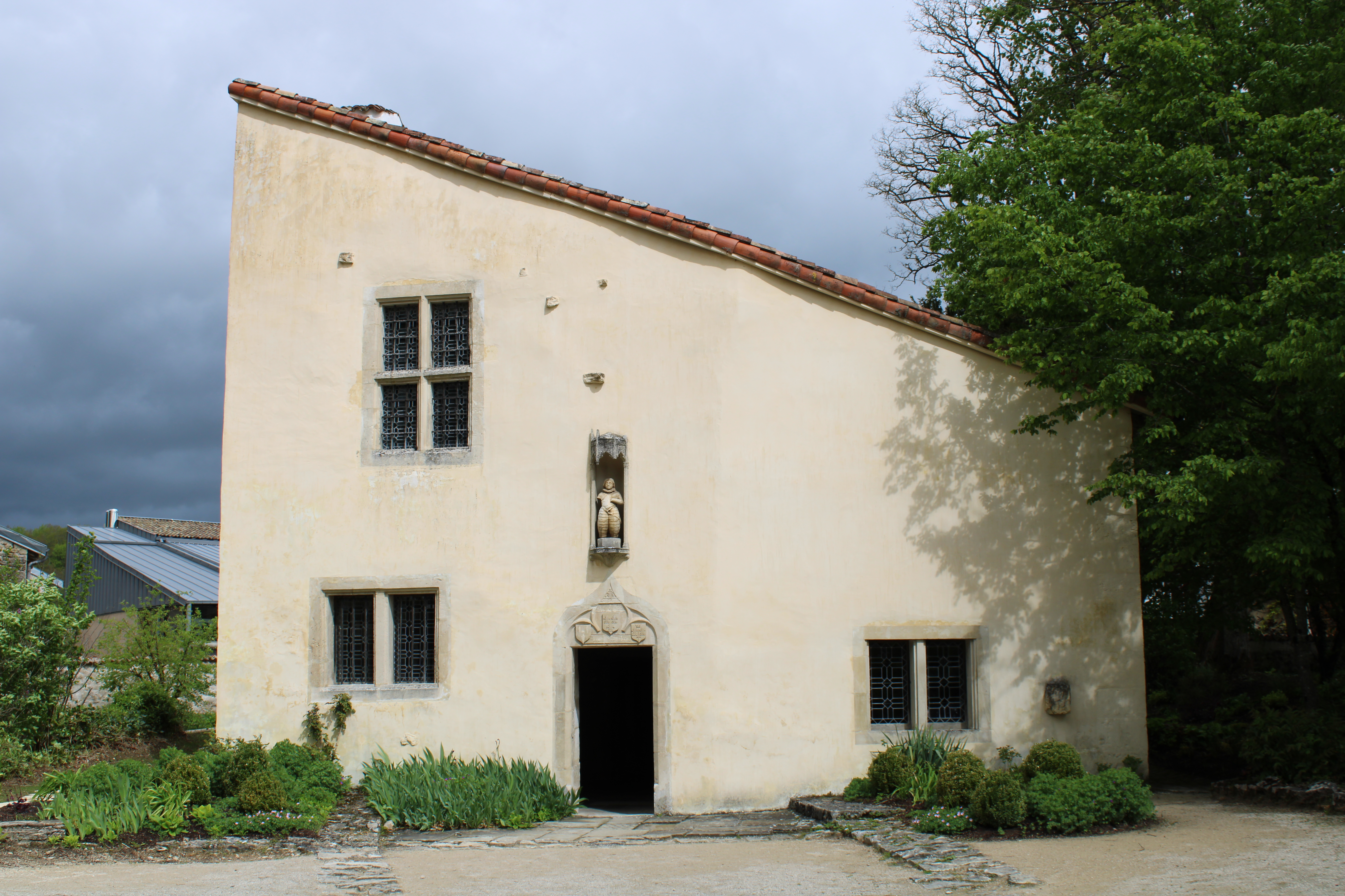 Vue de la maison